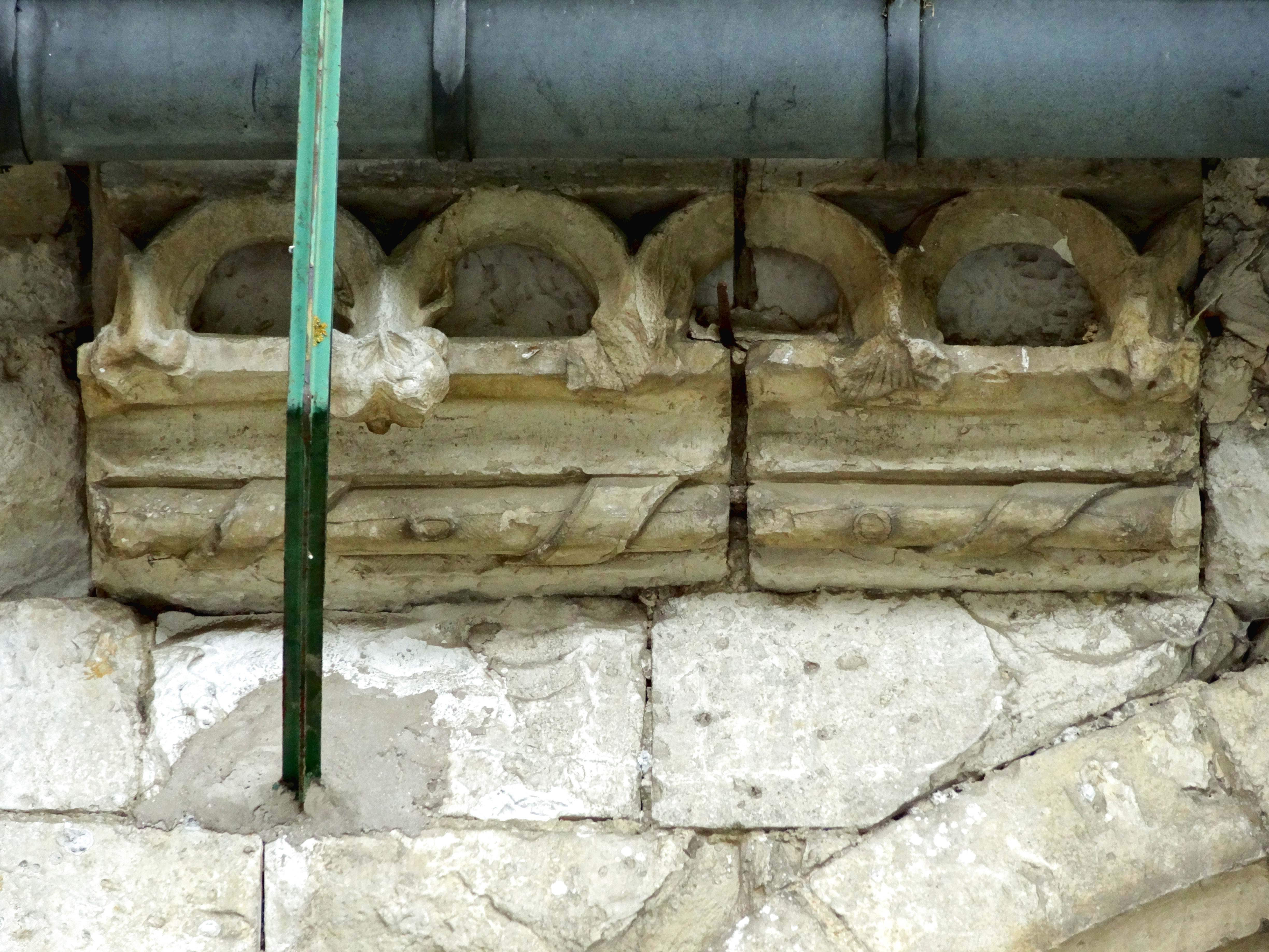 Église Saint-Martin de Maimbeville - voir titre.